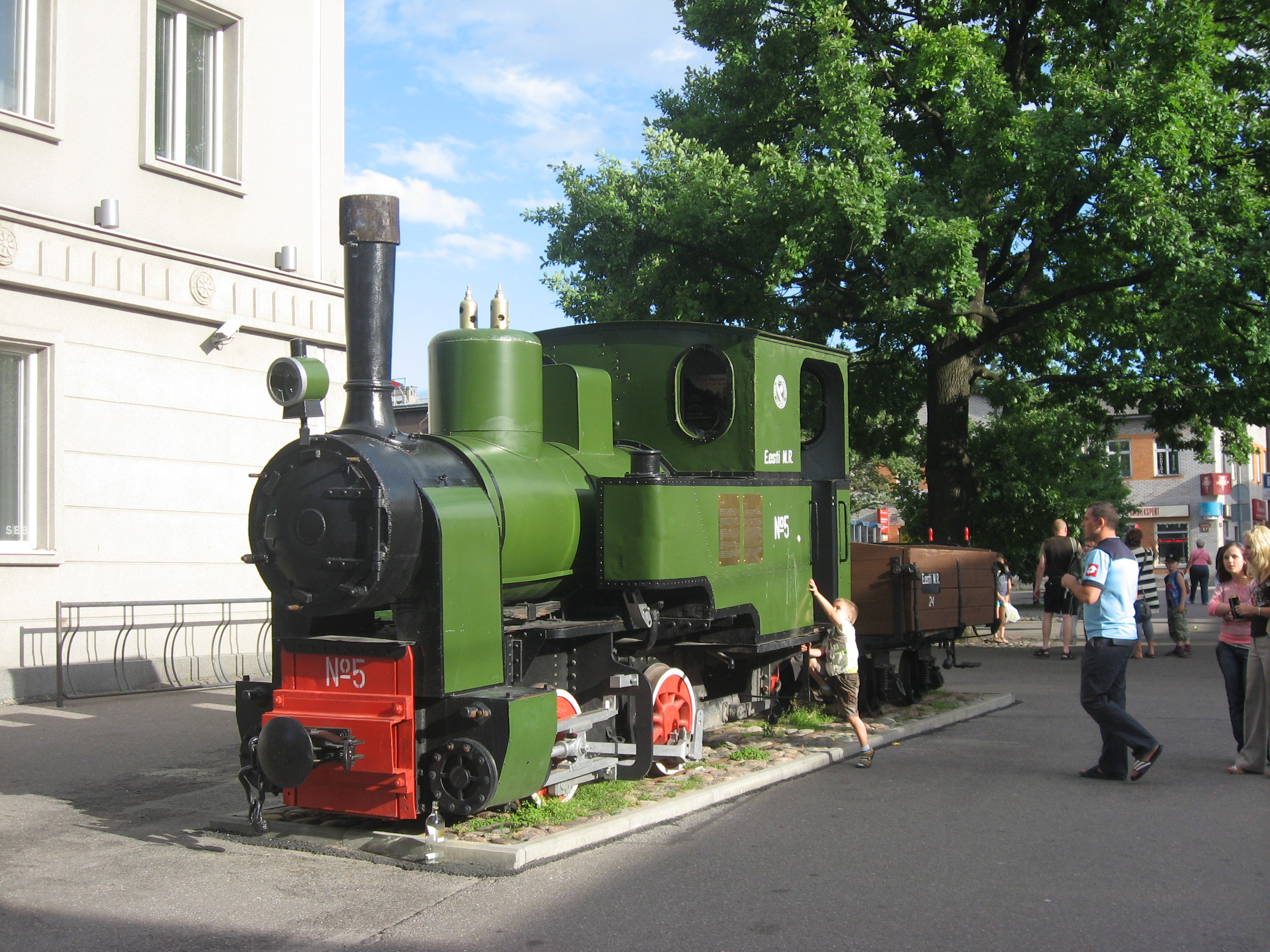 Pärnu, mašinka